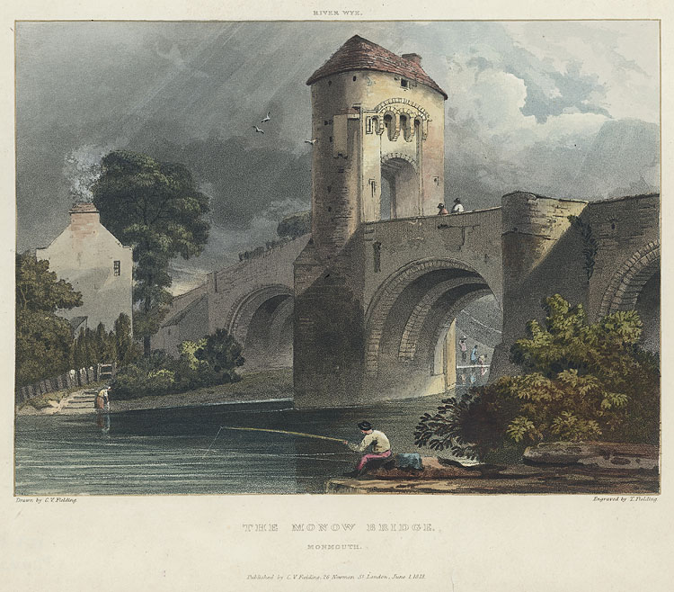 1 print : aquatint, col ; image size 155 x 211 mm., paper size 225 x 298 mm.